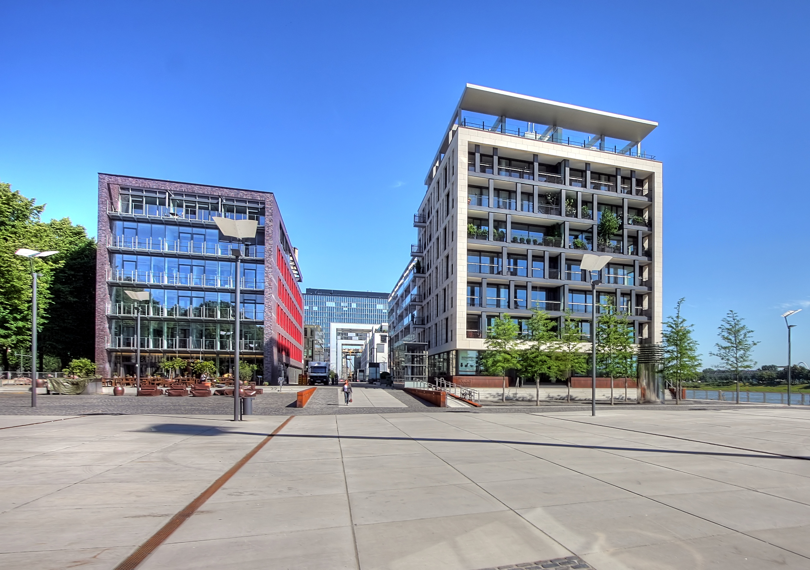 Rheinauhafen Köln. Von links nach rechts: Baufeld 21 und rhein³, Kranhaus (Hintergrund)